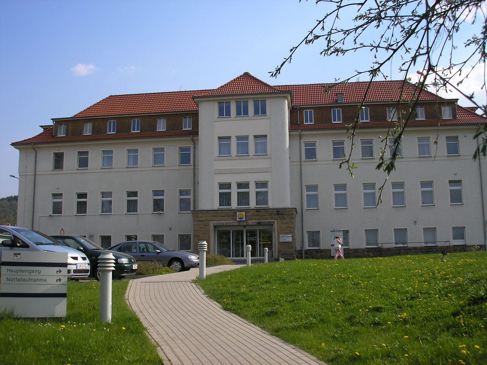 Der Altbau (1923) der Ilm-Kreis-Kliniken in Ilmenau (Thüringen).